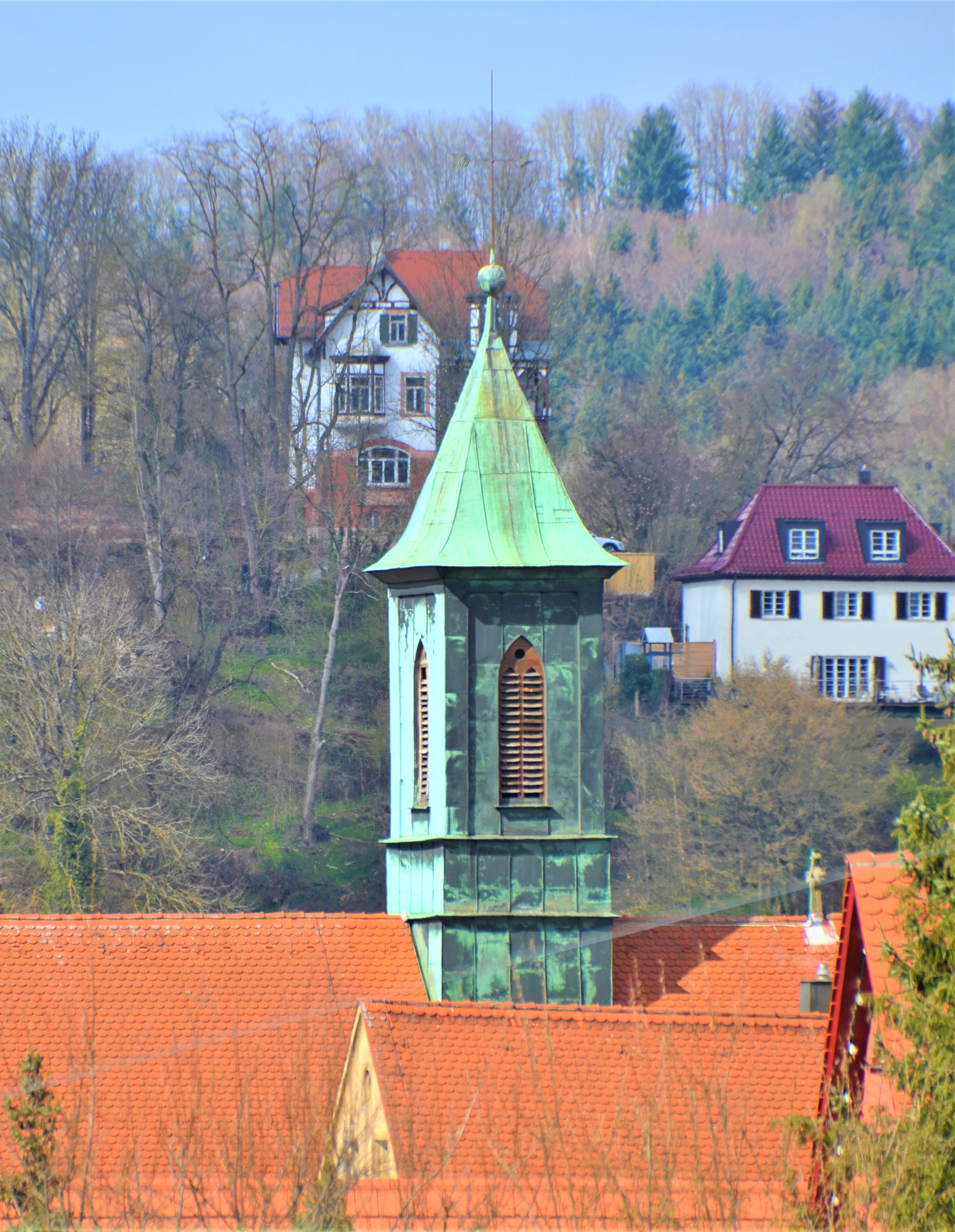 Dachreiter von St. Franziskus vom Zeiselberg aufgenommen